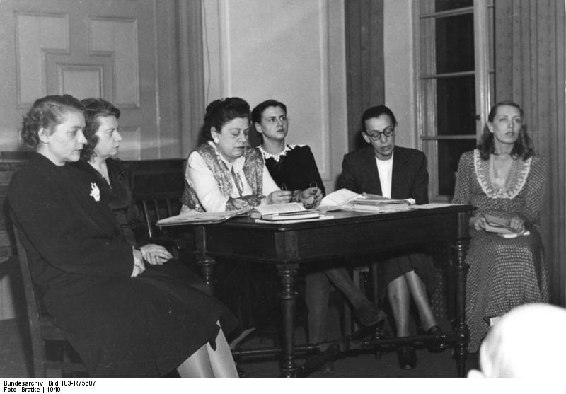 Berlin, Frauentagung, Kulturbund Illus-dpd-Bratke Berlin 1949 Als Abschluß der Internationale Frauentagung fand im Kulturbund eine Veranstaltung "Die Frau in der Weltliteratur" statt, an der u.a. (v.l.) Inge von Wangenheim, Mary Schneider-Braillard, Annemarie Hasse, Angelika Hurwicz, Helene Weigel und Else Reuss teilnahmen. 2945-49 Abgebildete Personen: Wangenheim, Inge von: Schauspielerin, Schriftstellerin, Redakteurin, Journalistin, Clara-Zetkin-Medaille 1959, Heinrich-Heine-Preis 1968, DDR Hurwicz, Angelika: Schauspielerin am Deutschen Theater Berlin, DDR Weigel, Helene: Schauspielerin, Leiterin des Berliner Ensembles, Gründungsmitglied der Deutschen Akademie der Künste (AdK), Gattin von Bert Brecht, DDR (PND 118630091)